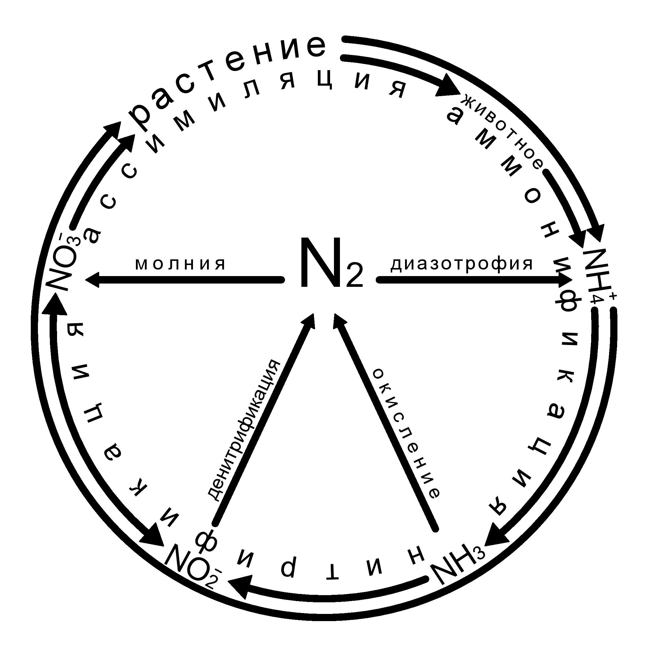 Классическая схема круговорота азота